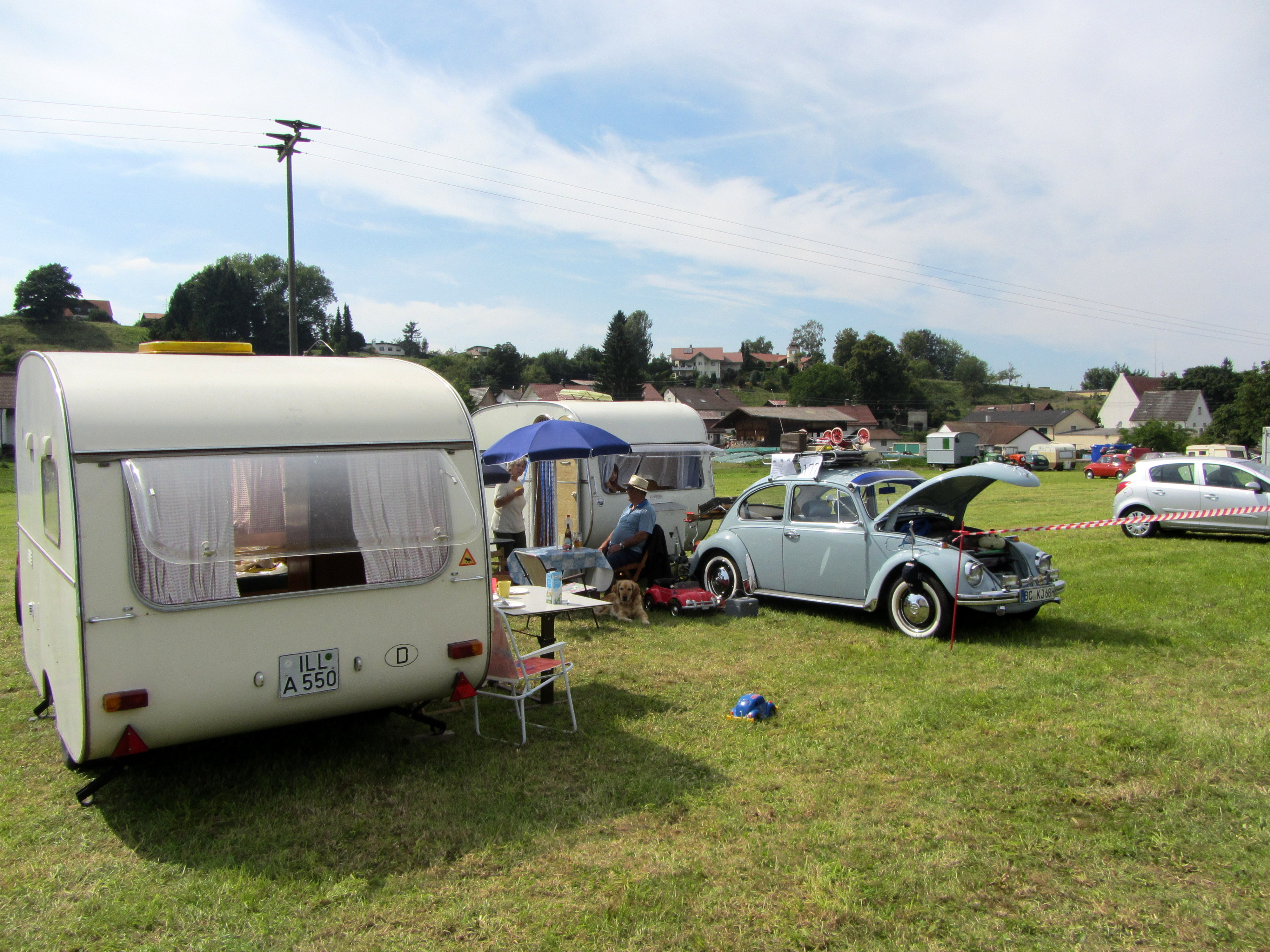 Dorffest Rot an der Rot 2012 - Camping in den 1960-er Jahren